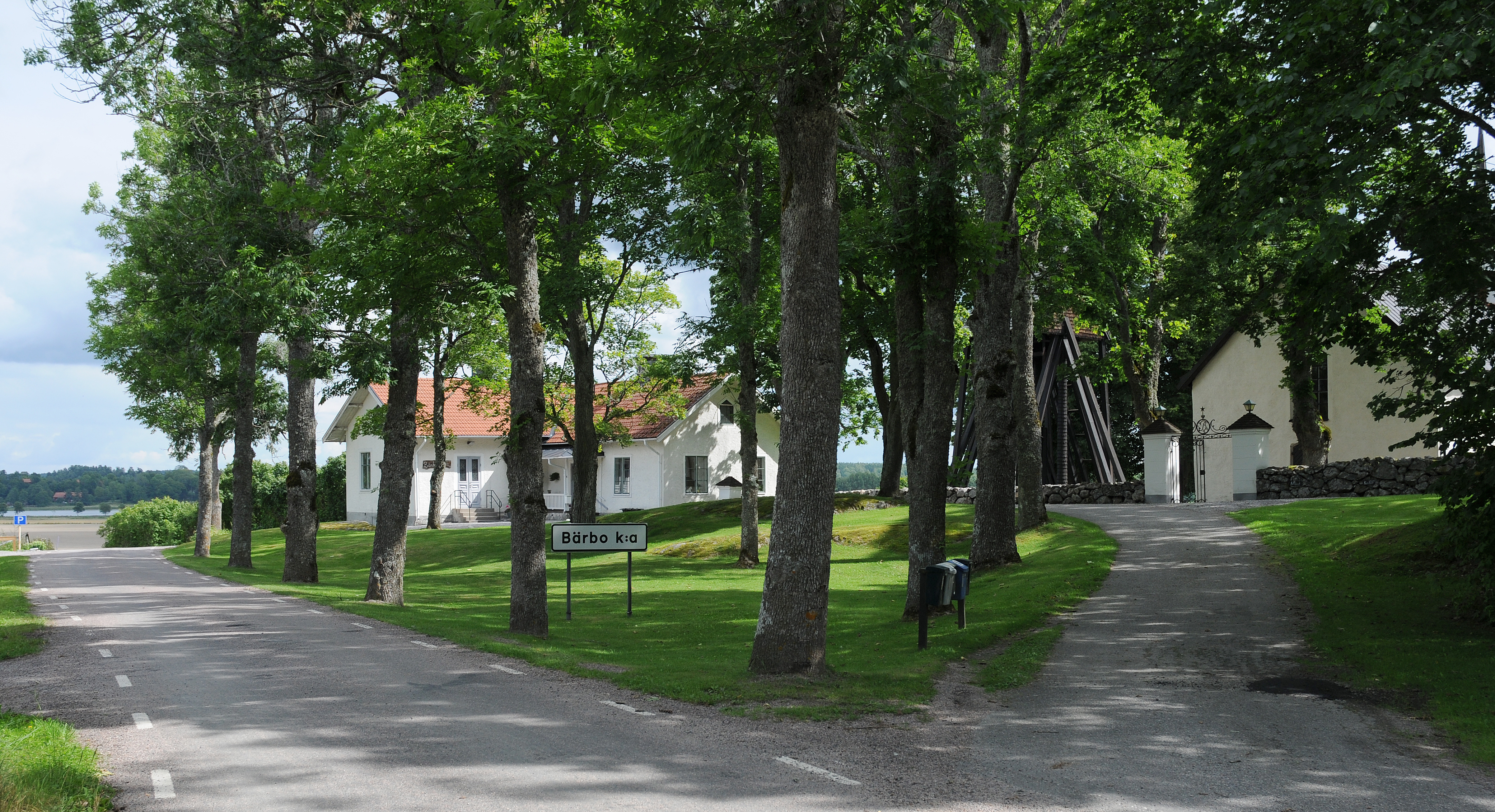 Bärbo by i Nyköping.